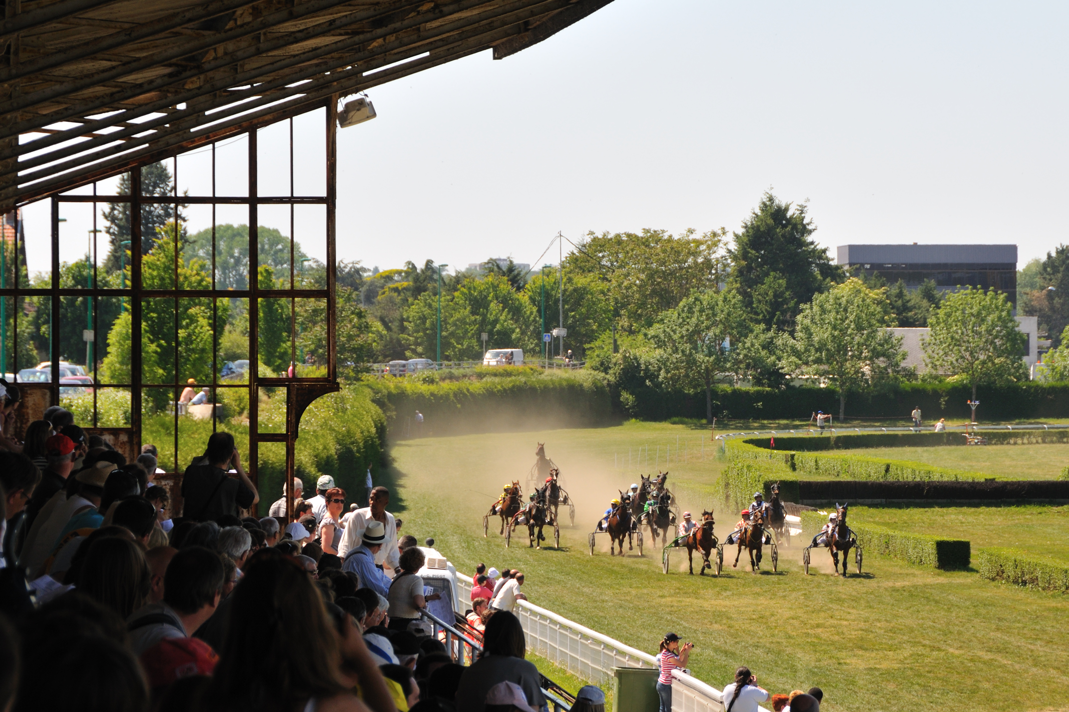 Hippodrome de l'Île Arrault, Orléans, Loiret, France